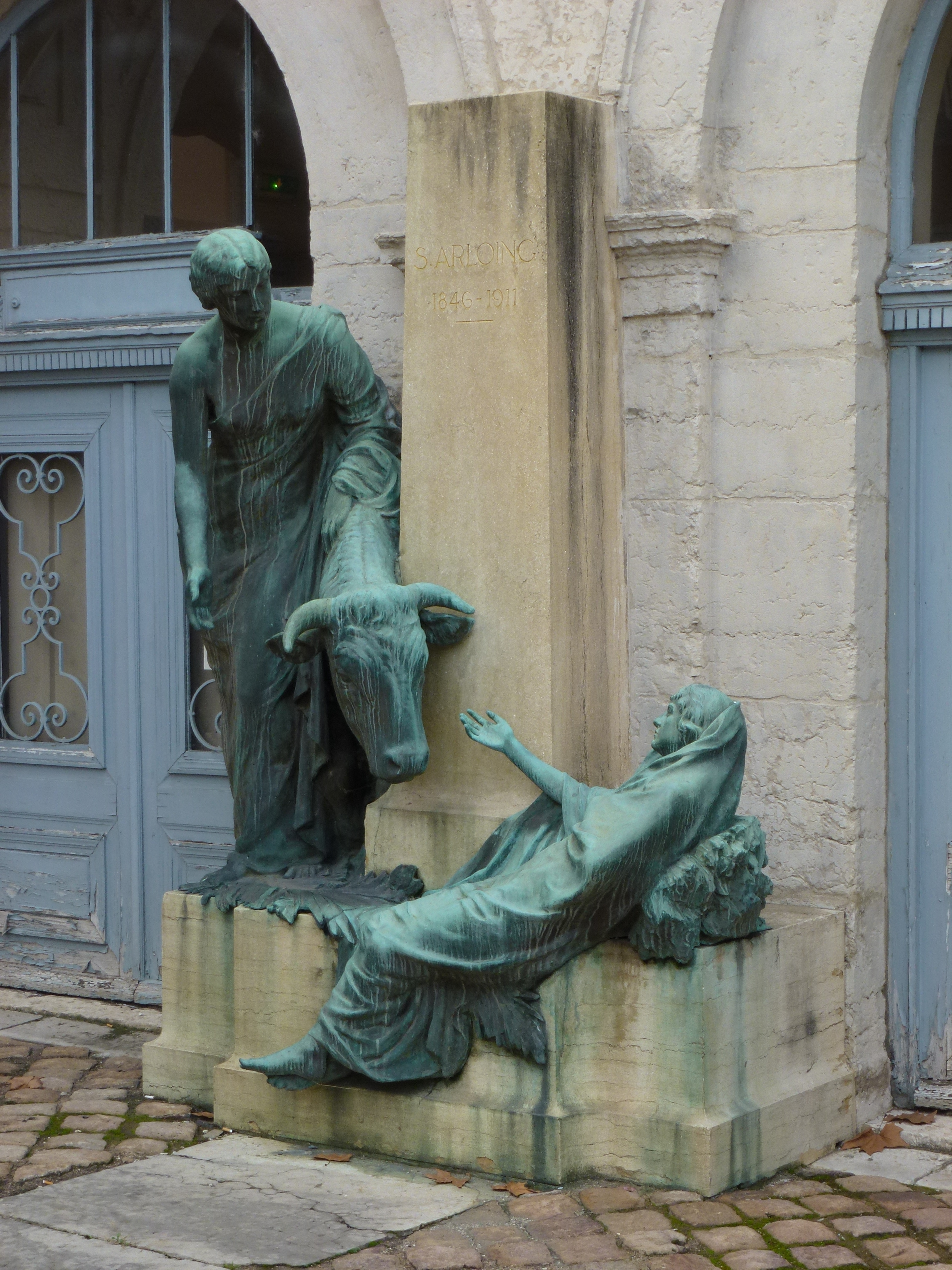 Statue allégorique en l'honneur du vétérinaire Saturnin Arloing (1846-1911) à l'entrée de l'ancienne école vétérinaire de Lyon (quai Chauveau)